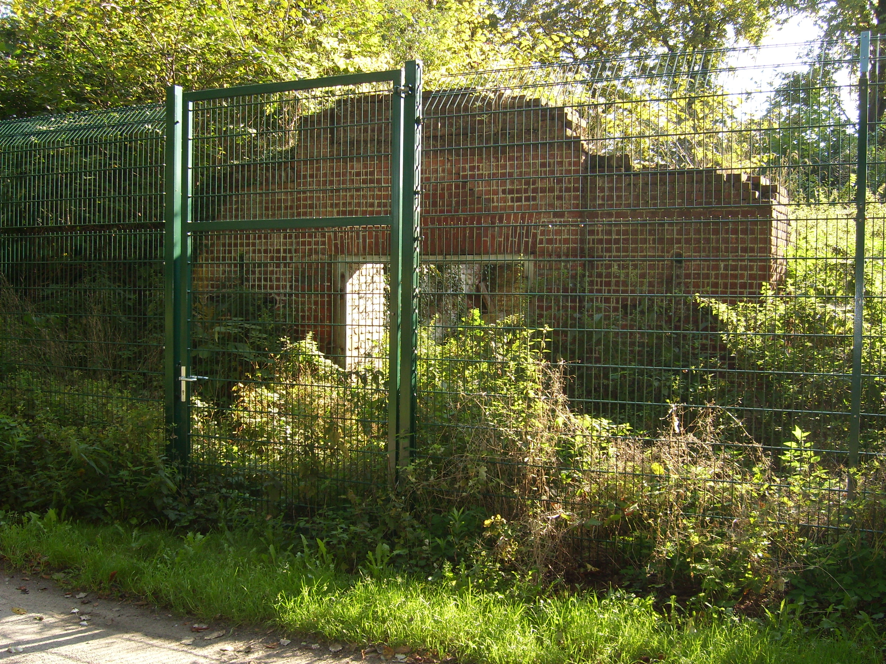 Überreste des zum Kloster Eldena gehörenden Bierkellers. Wird von prioritären Fledermausarten als Winterquartier genutzt und steht daher unter Naturschutz.